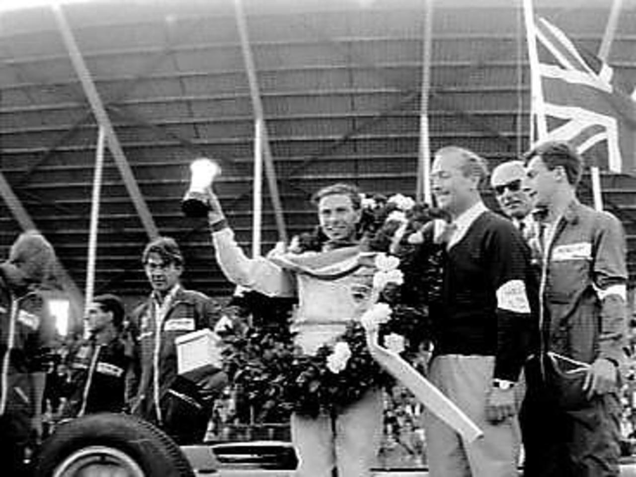 Jim Clark après avoir remporté le Grand Prix des Pays-Bas 1963